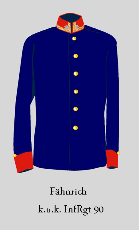 k.u.k. Fähnrich in deutscher Uniform mit amarantroter Egalisierung und gelben Knöpfen